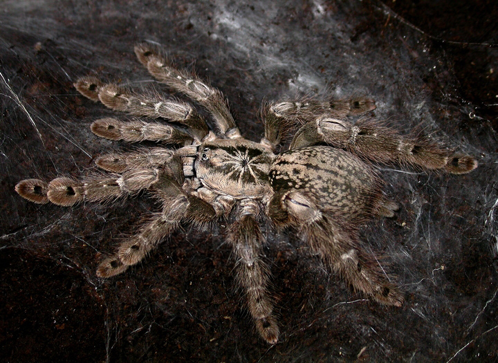 female adult Heteroscodra maculata